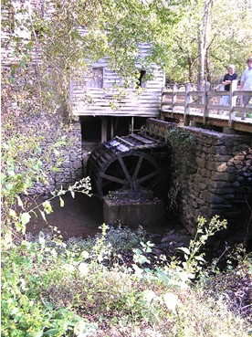 eno watermolen Ook eigen foto van Jcwf, vermoed ik? Andre Engels Yep